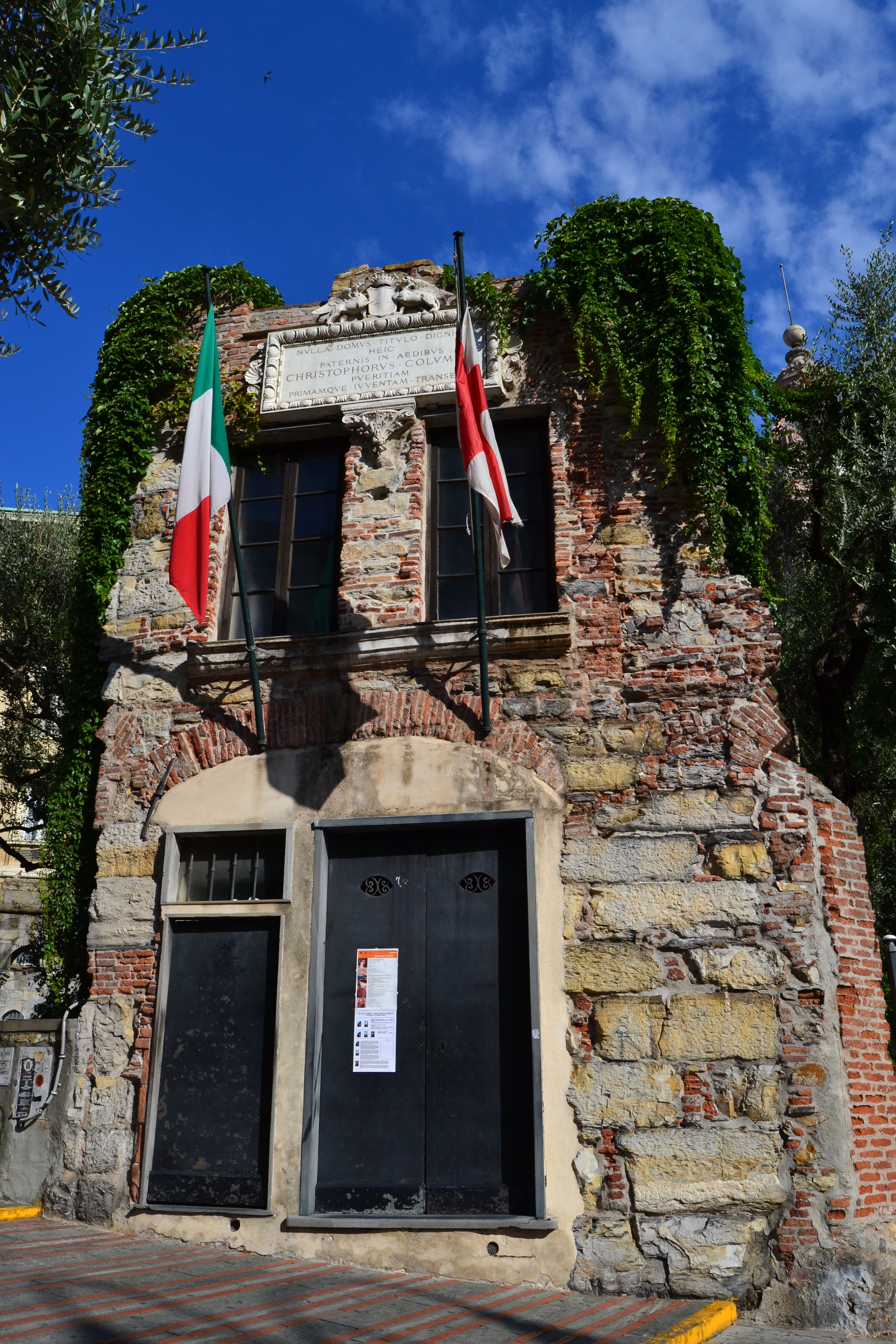 Casa di Colombo This is a photo of a monument which is part of cultural heritage of Italy.